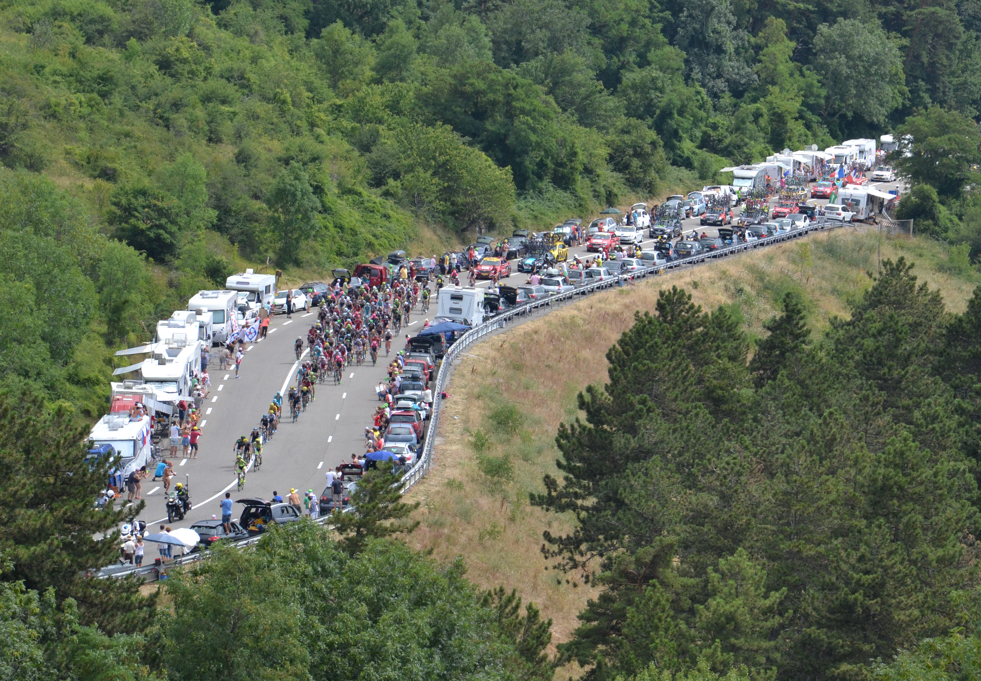 Passage du peloton dans le col de l'Escrinet.